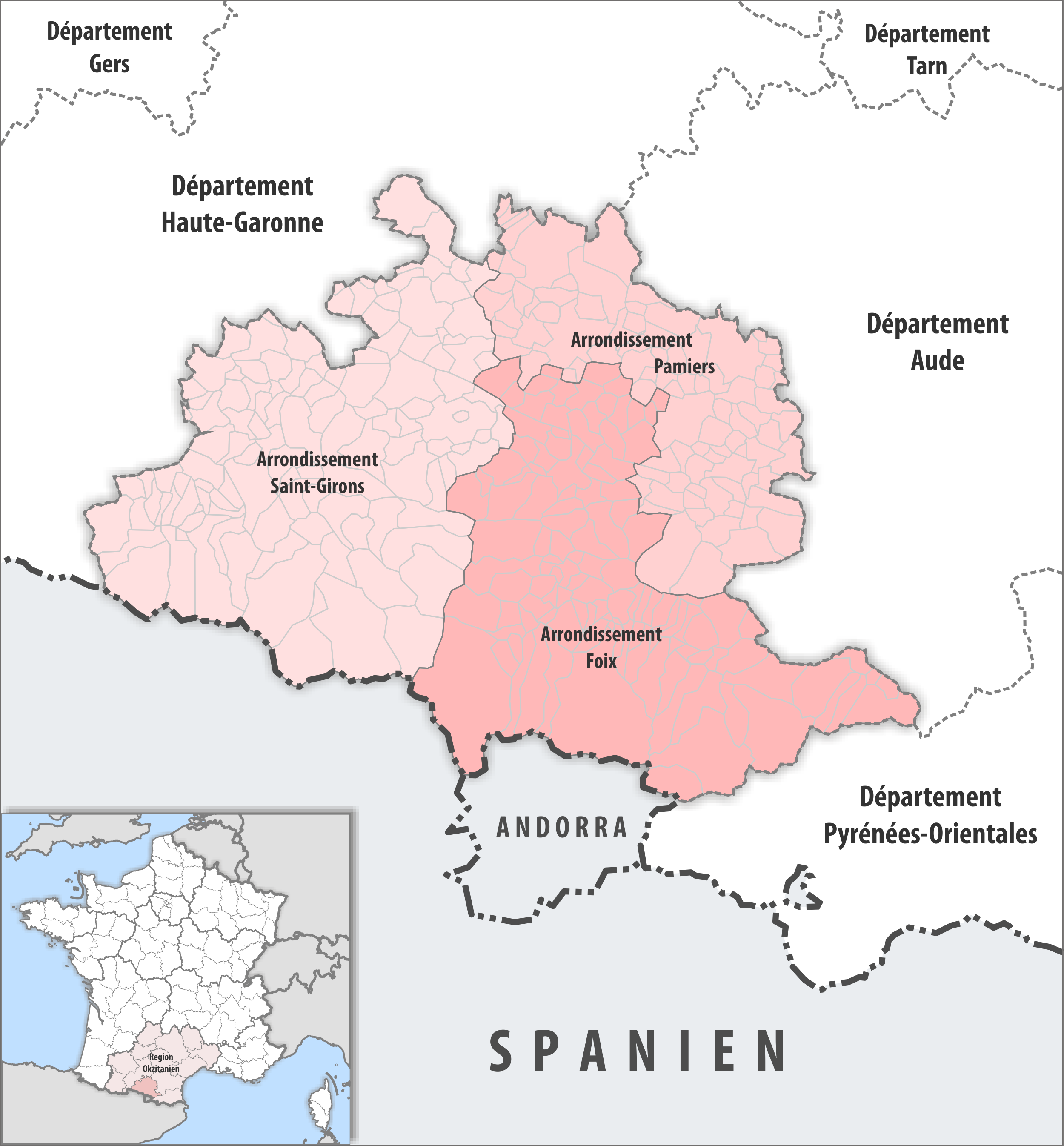 Gemeinden und Arrondissemente im Departement Ariège